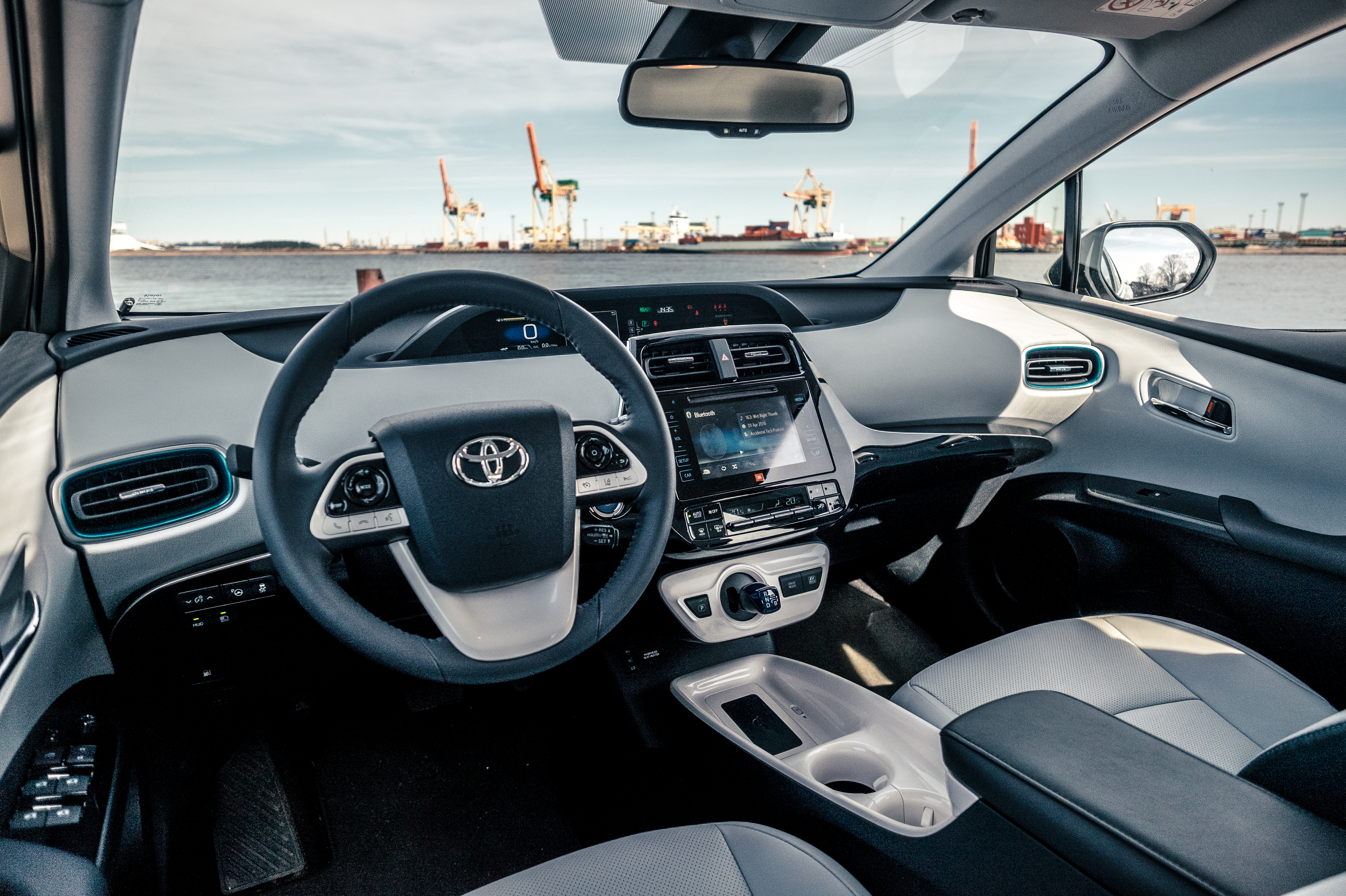 Toyota Prius 2016